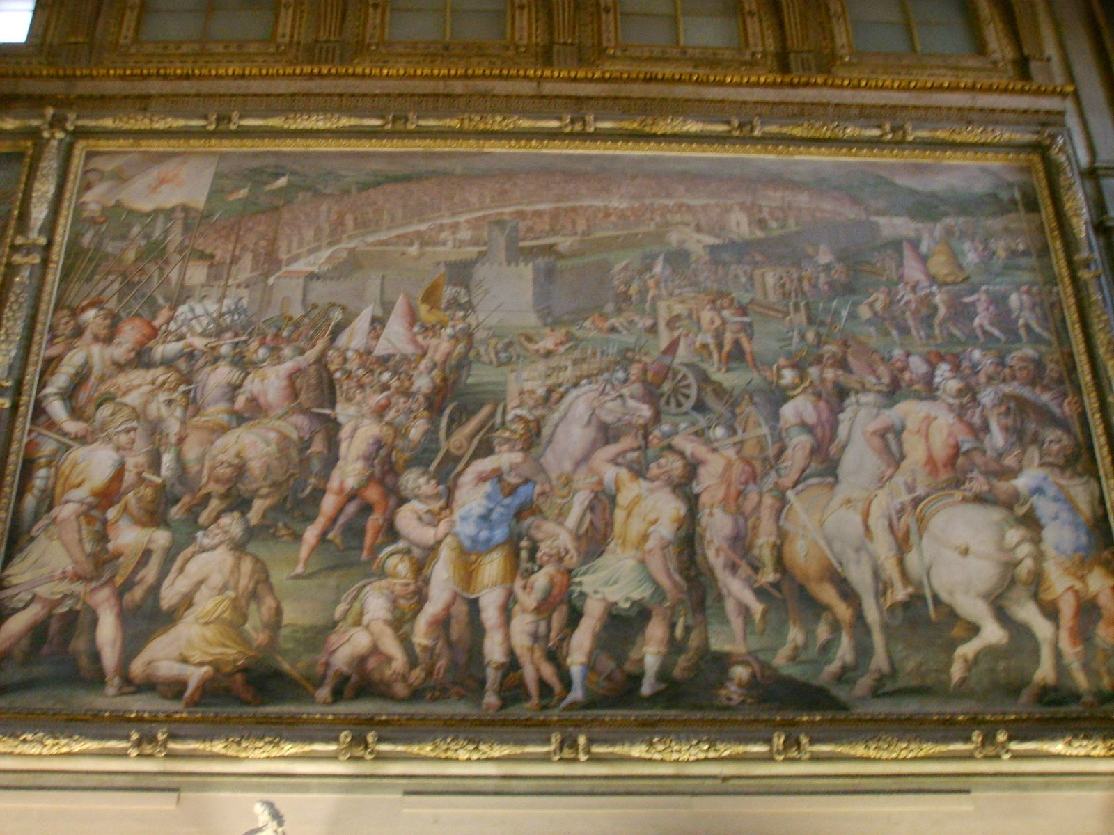 Palazzo vecchio, salone dei 500 giorgio vasari